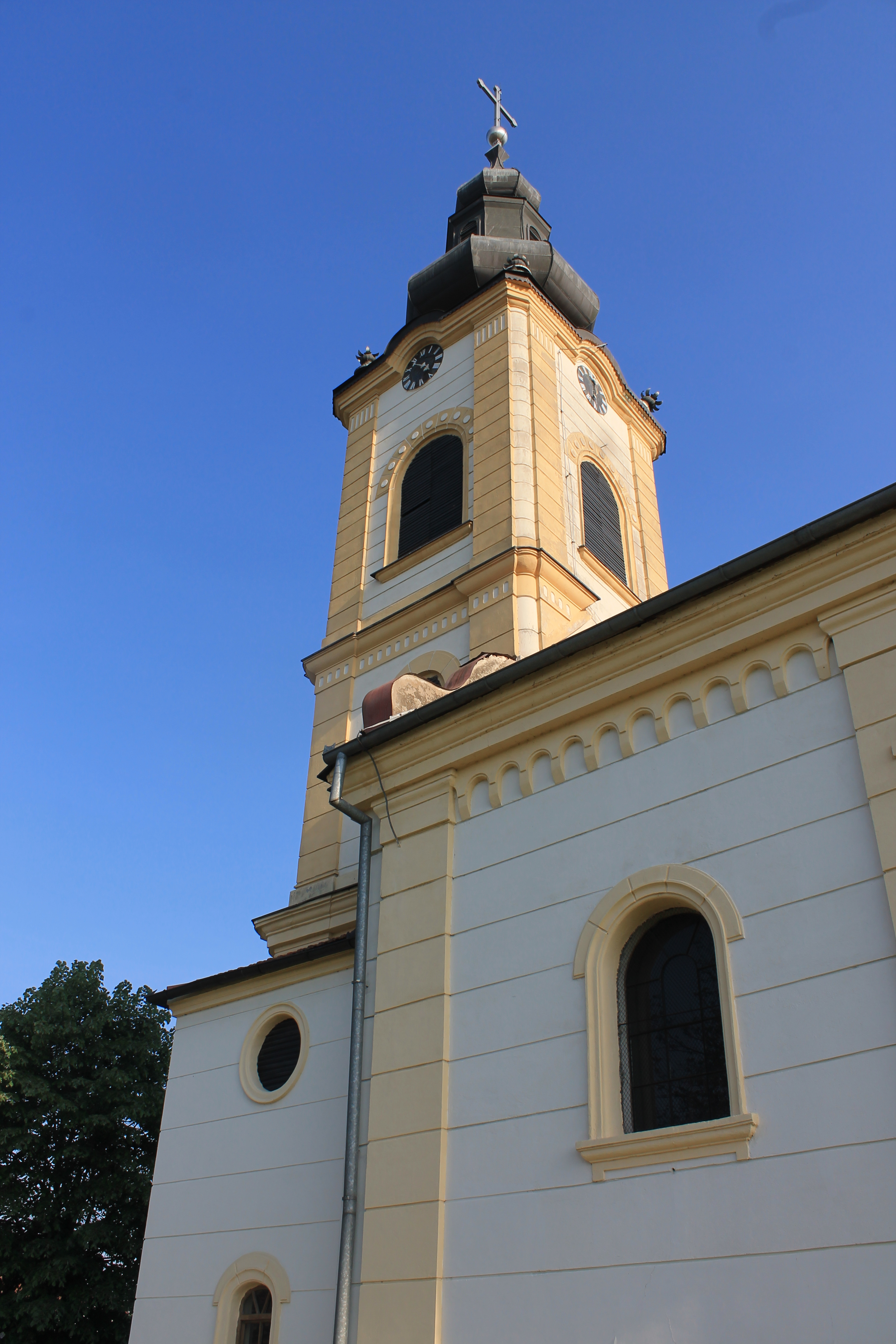 Crkva Sv. Georgija